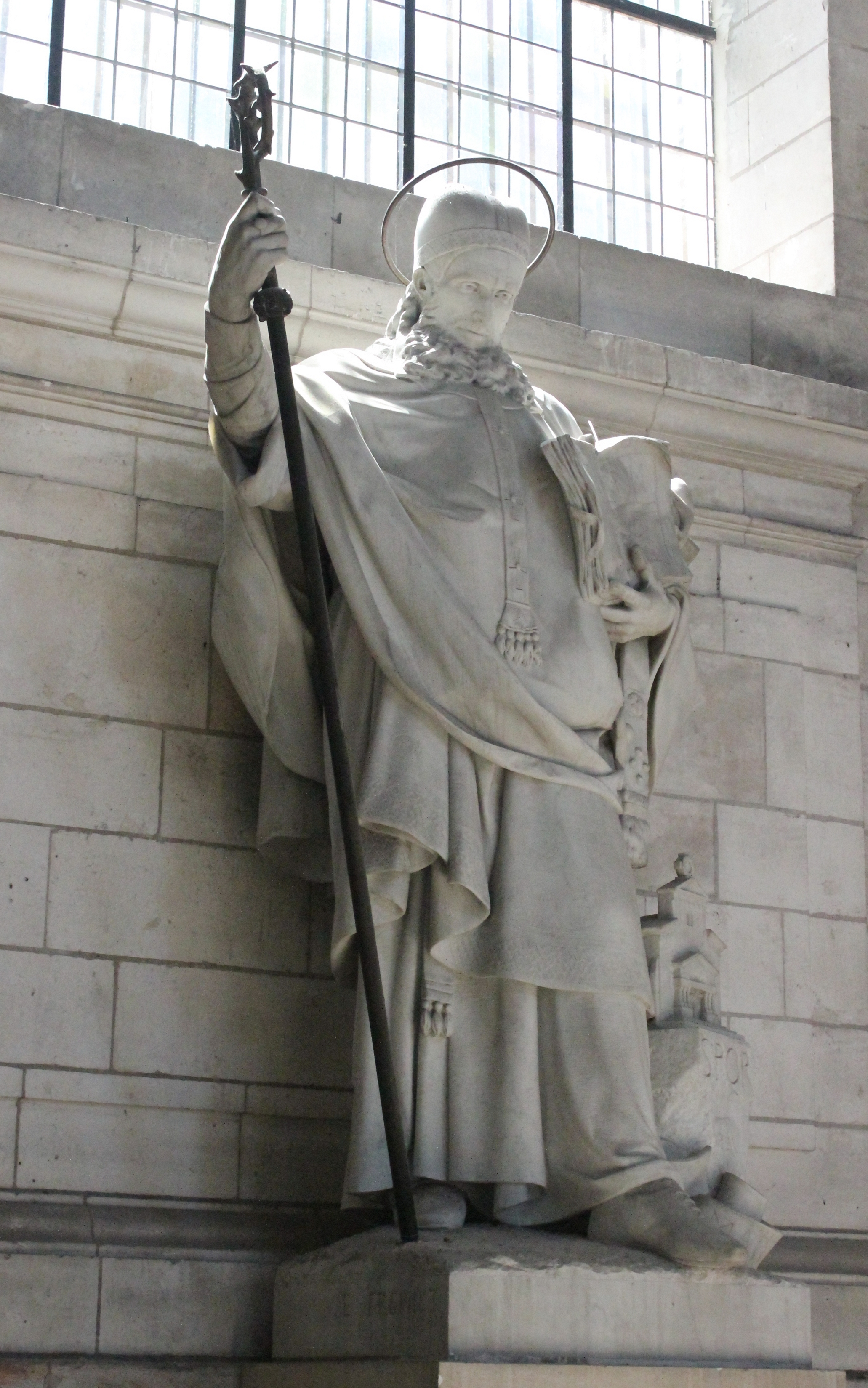 Cathédrale Notre-Dame-et-Saint-Vaast d'Arras, statue de Saint Grégoire de Tours, sculptée par Emmanuel Frémiet en 1875 env. pour le Panthéon (Ste. Geneviève) à Paris